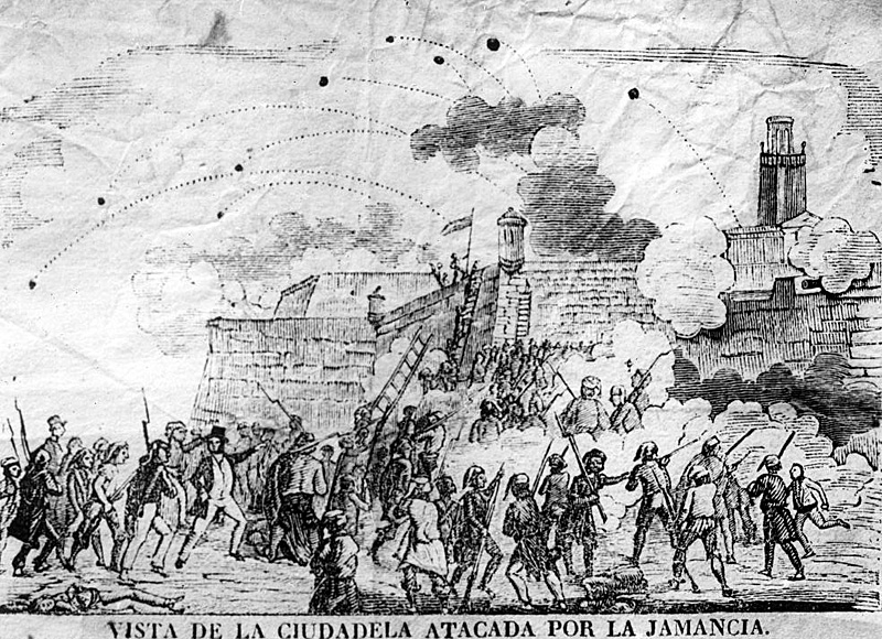 La Ciudadela atacada por la Jamància, Barcelona (1843).